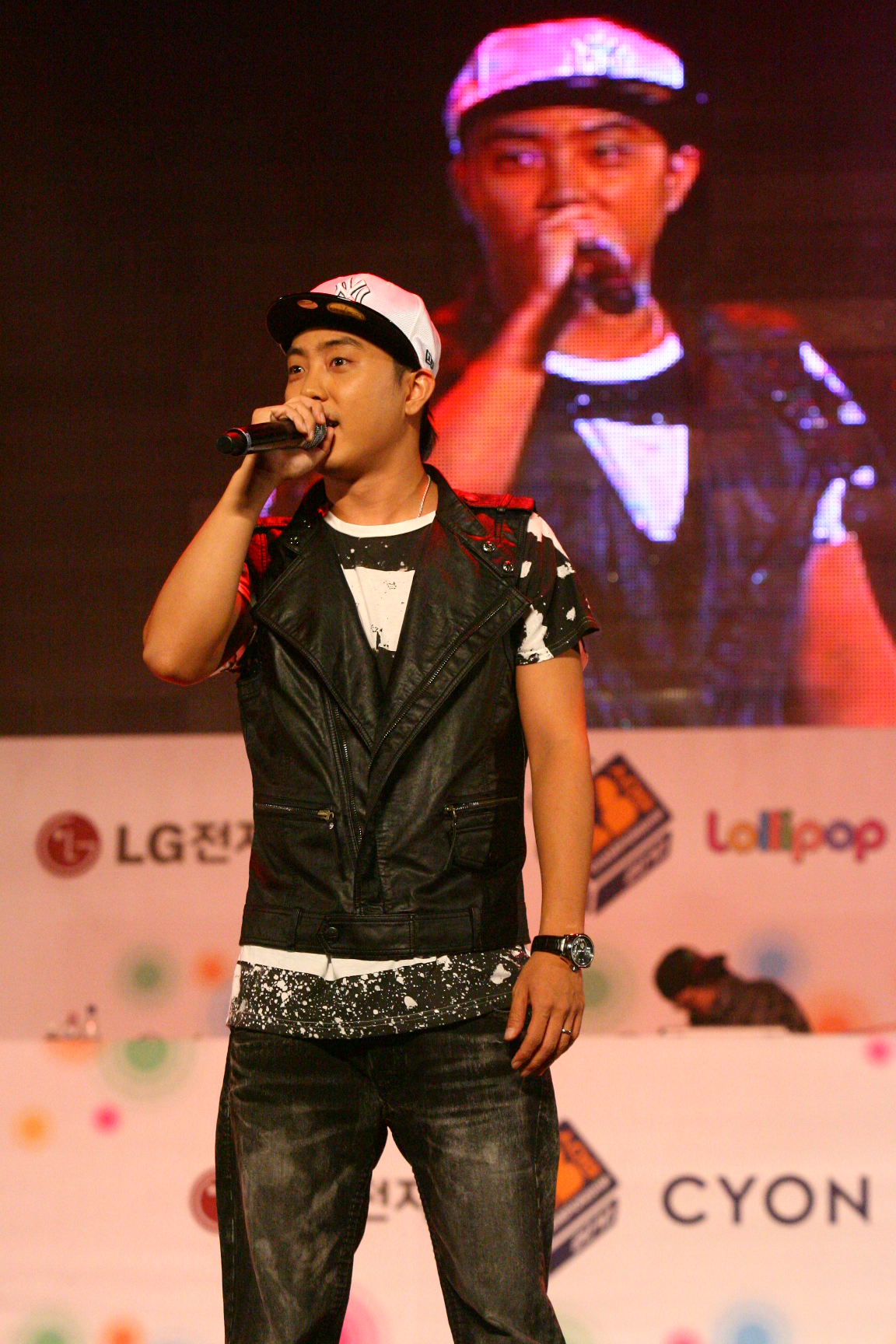 LG전자가 29일 저녁 잠실 올림픽공원에서 ‘제 4회 CYON 비보이 챔피언십 2010’ 본선대회를 열었다. ‘07년에 시작된 이 행사는 올해로 4회째를 맞는 명실상부 국내 최대 비보이 축제로 자리잡았다. 이날 행사에서는 3,000여 명의 관람객들이 참석한 가운데, 비보이들의 화려한 댄스 배틀과, 은지원, 에픽하이, 타이거JK, 윤미래, 앰블랙, 슈프림팀 등 국내 인기 가수들이 참여한 ‘롤리팝 콘서트’가 함께 진행됐다.